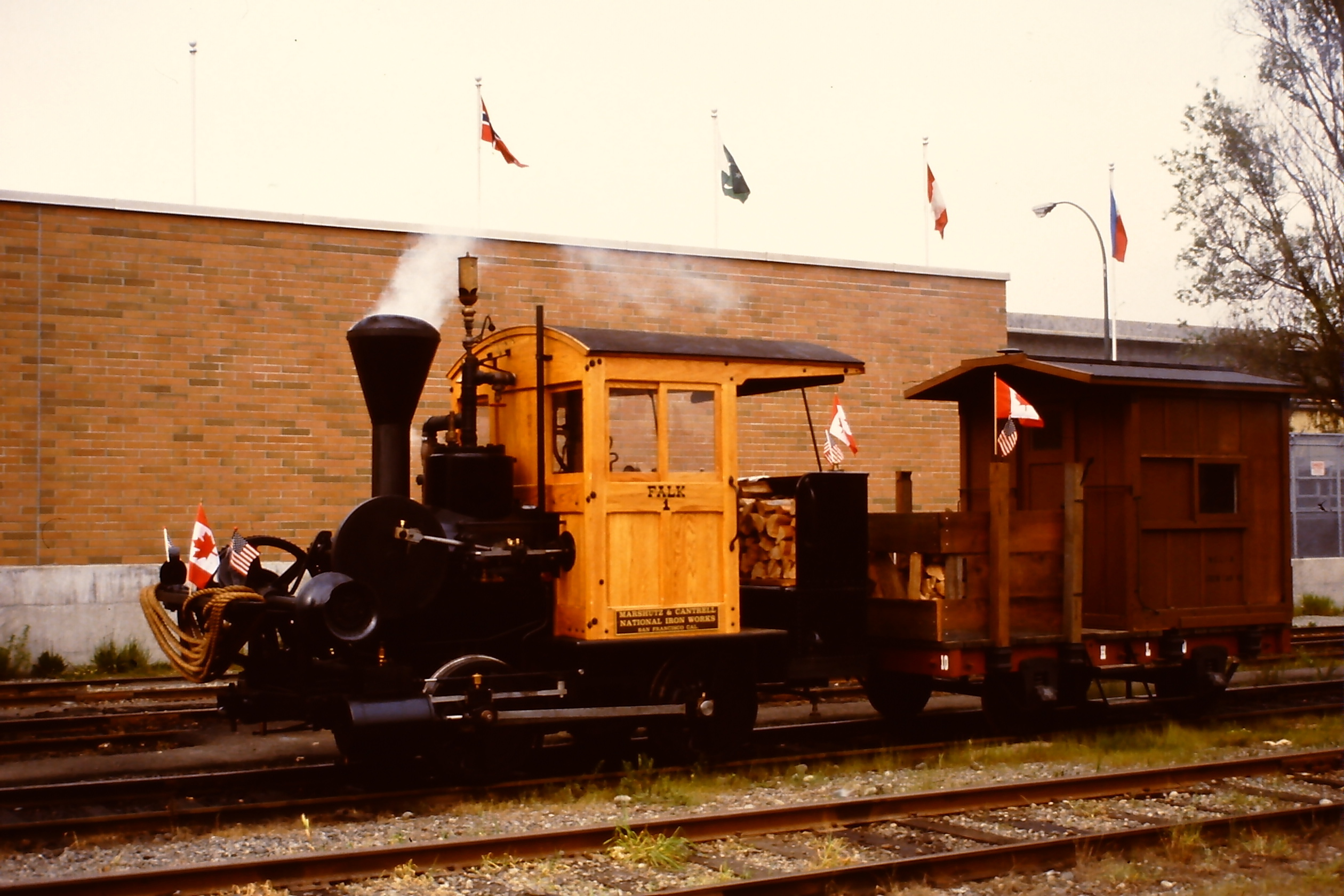 Dampflokomotive Falk Nummer 1 auf der SteamExpo 86 in Vancouver